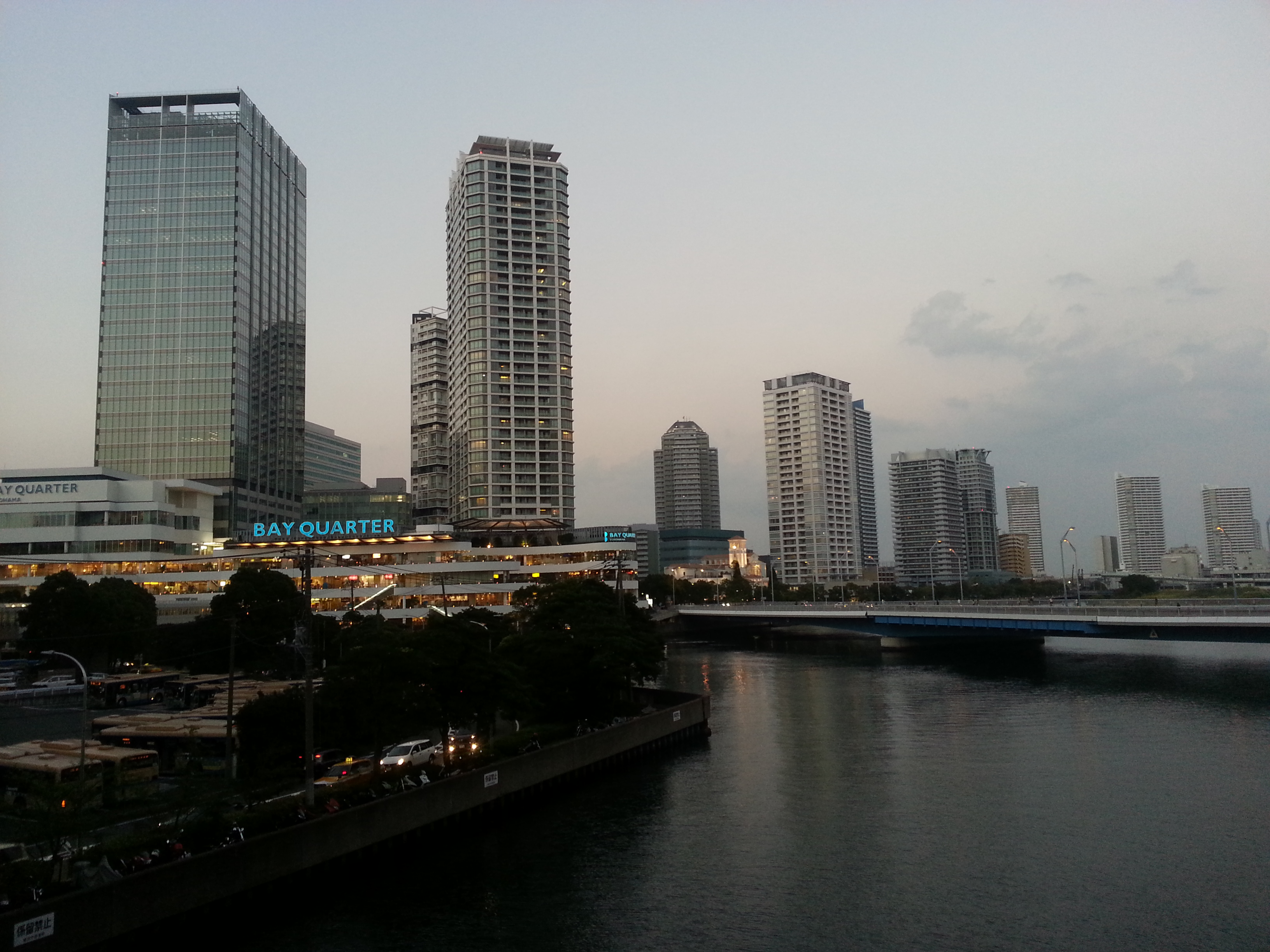 横浜ベイクォーターとポートサイド地区、はまみらいウォークより撮影。